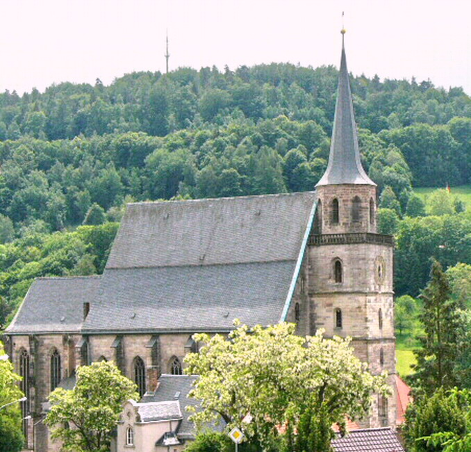 Petrikirche in Kulmbach